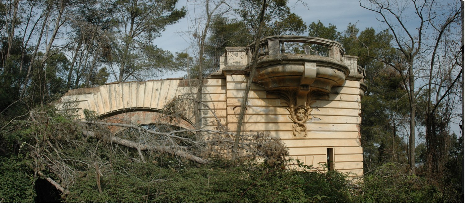 Antic Casino de l'Arrabasada